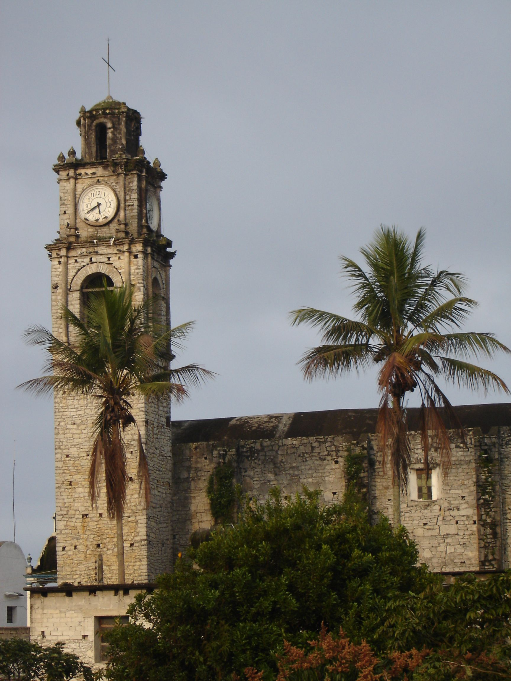 ES UNA BELLA TOMA DEL TEMPLO CATOLICO DE CAXHUACAN